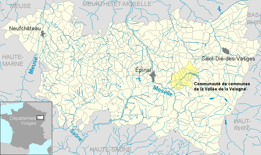 Communauté de communes de la Vallée de la Vologne dans le département des Vosges, Lorraine, France